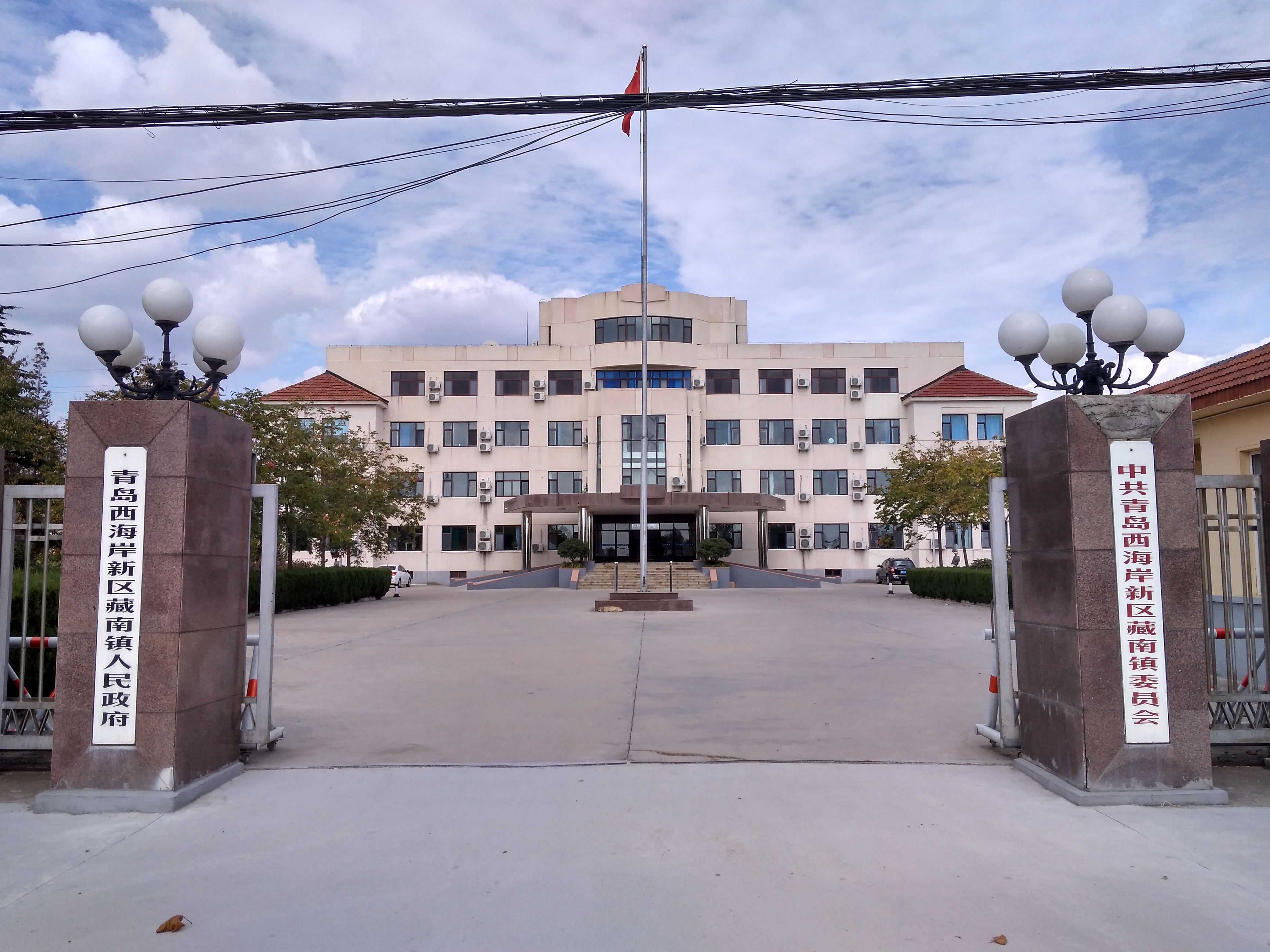 青岛西海岸新区藏南镇人民政府